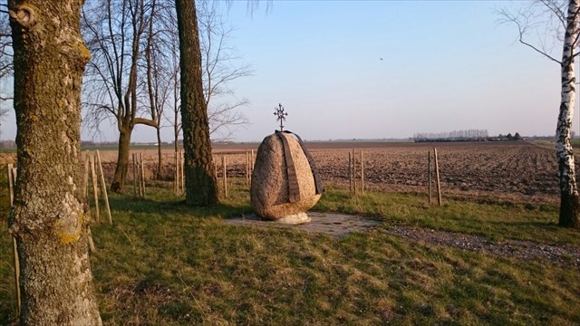 Paminklinis akmuo, stovintis kunigo Juozo Montvilos gimtinės vietoje.